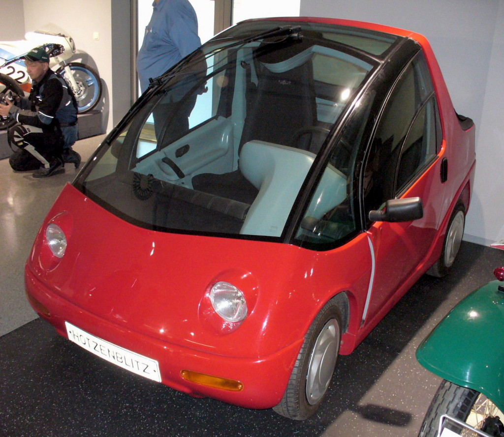 Hotzenblitz mit GFK-Karosserie, produziert 1993-1996 durch die Hotzenblitz Mobile Thüringen GmbH im Simson Fahrzeugwerk Suhl